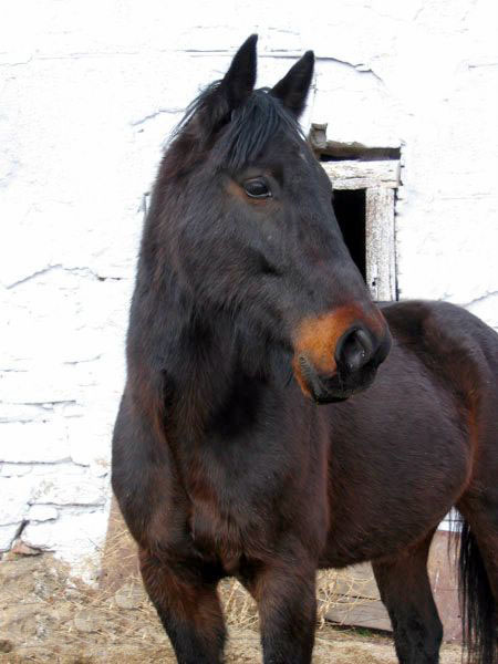 Kevin Tornado, Czech trotter gelding